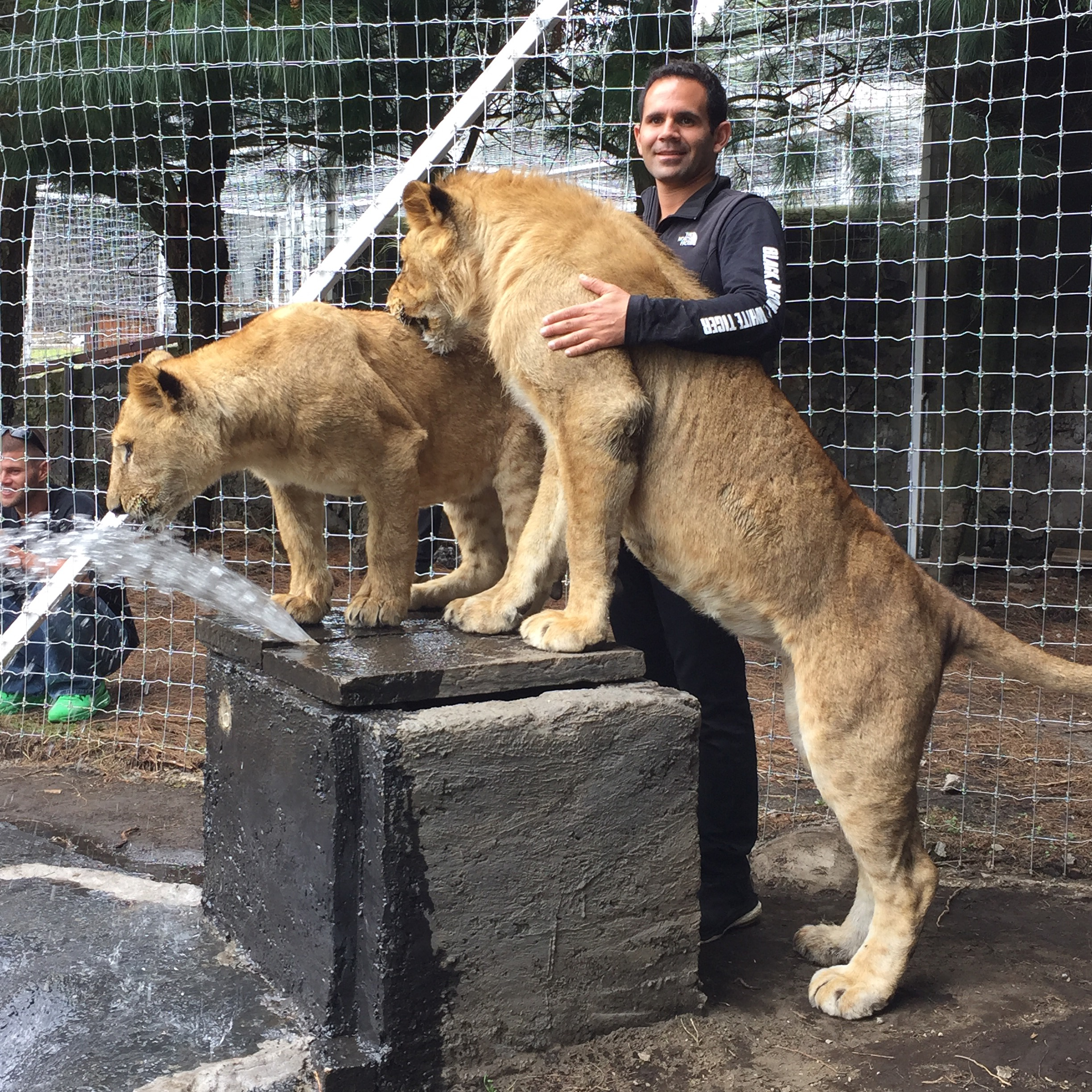 kjhdjs